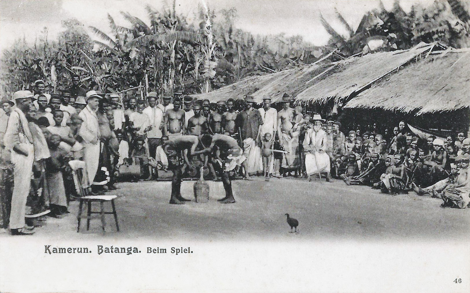 Kamerun. Batanga. Beim Spiel. pas de mention d'auteur, d'éditeur ou de date